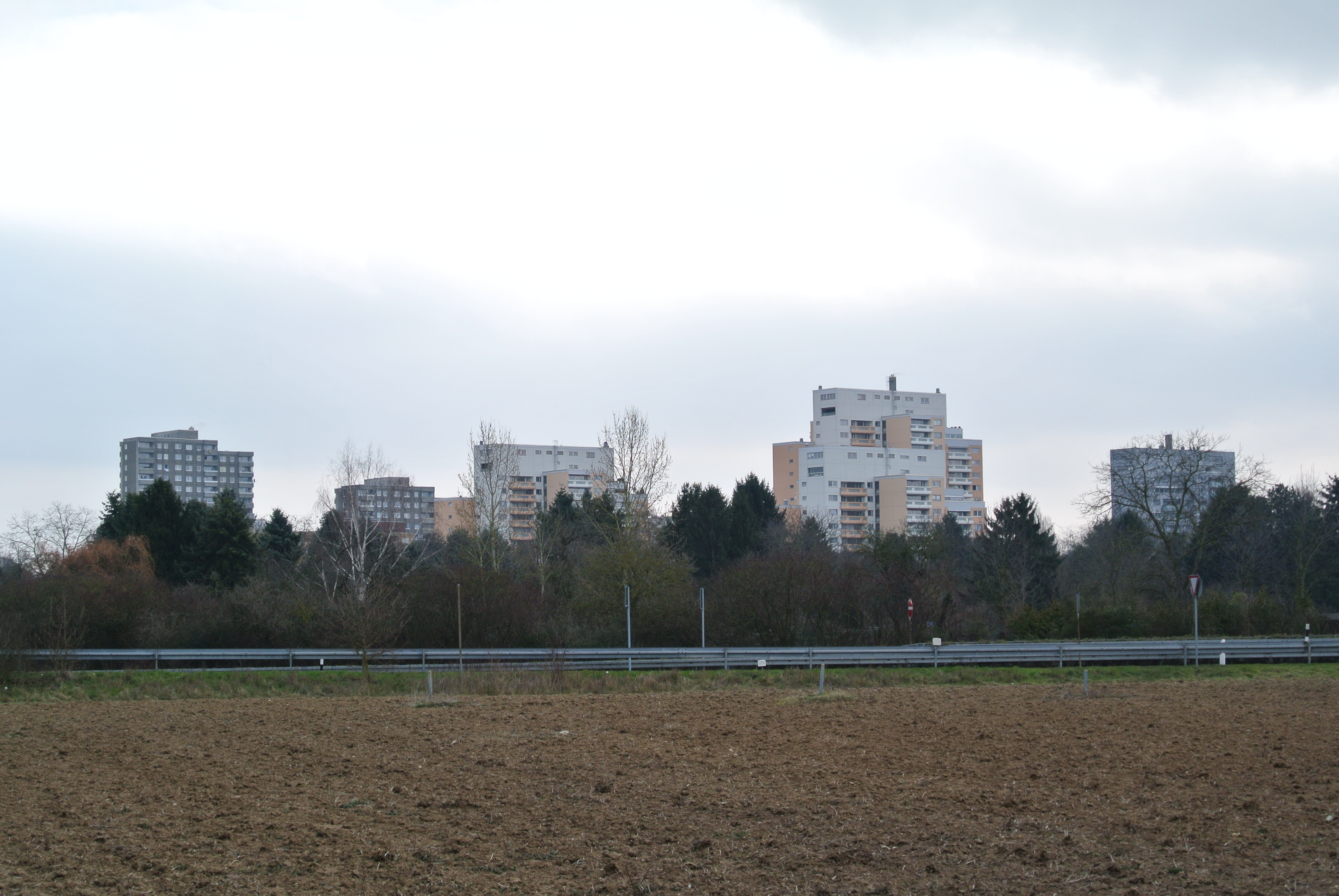 Siedlung Sigmund-Freud-Straße Frankfurt-Eckenheim Fernblick von Norden